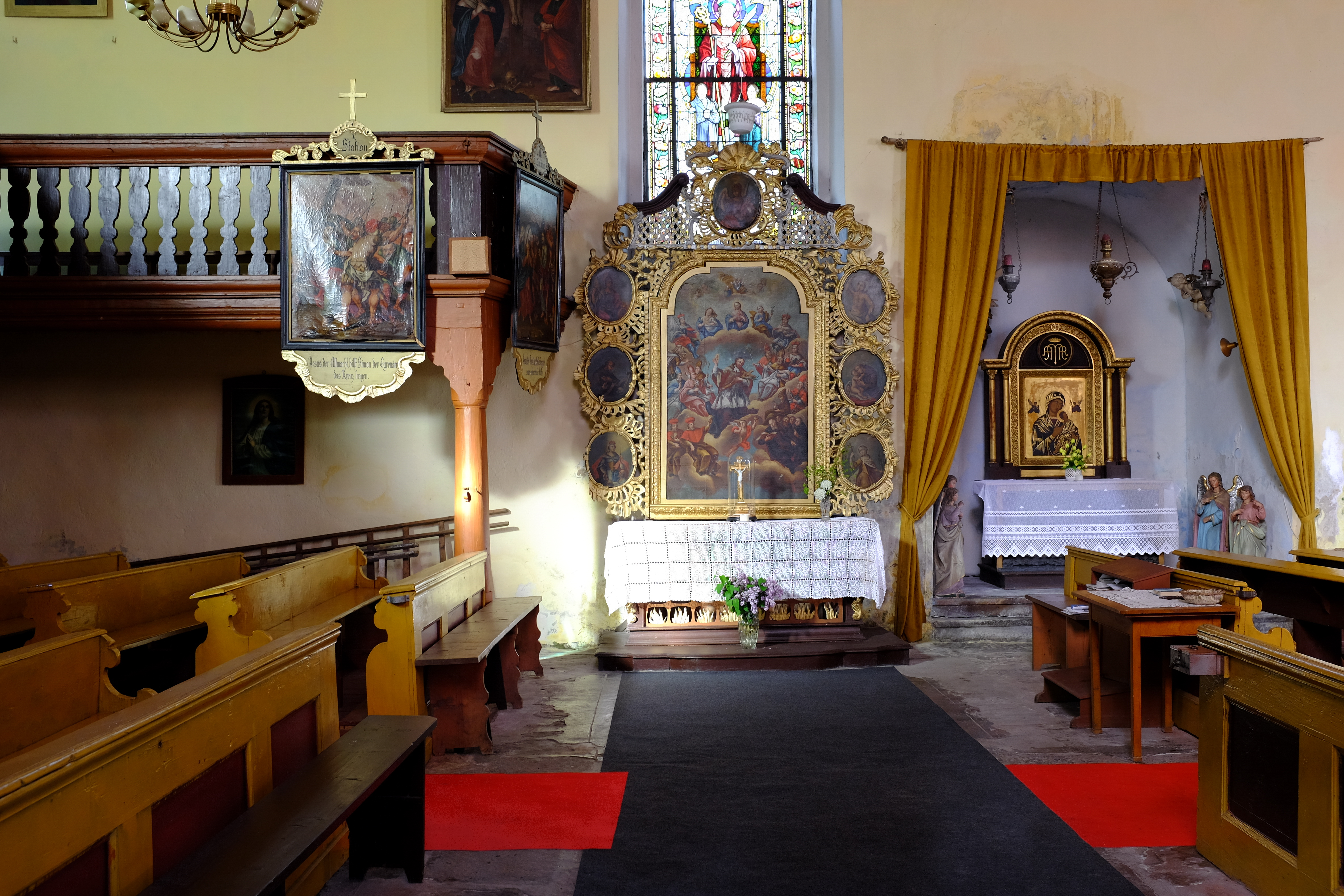 Kostel Nejsvětější Trojice, Pernink.